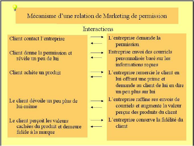 Relation client entreprise dans un contexte de permission marketing